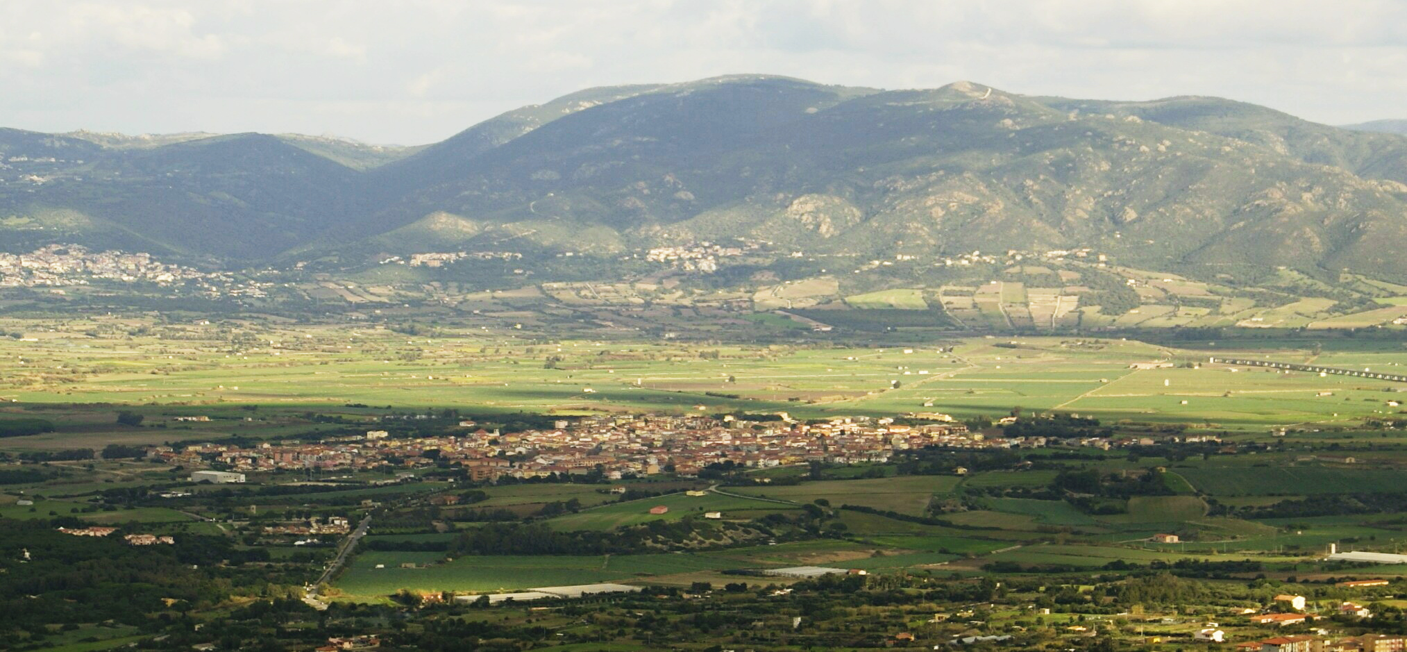 Panorama di Valledoria (Monte Ossoni)